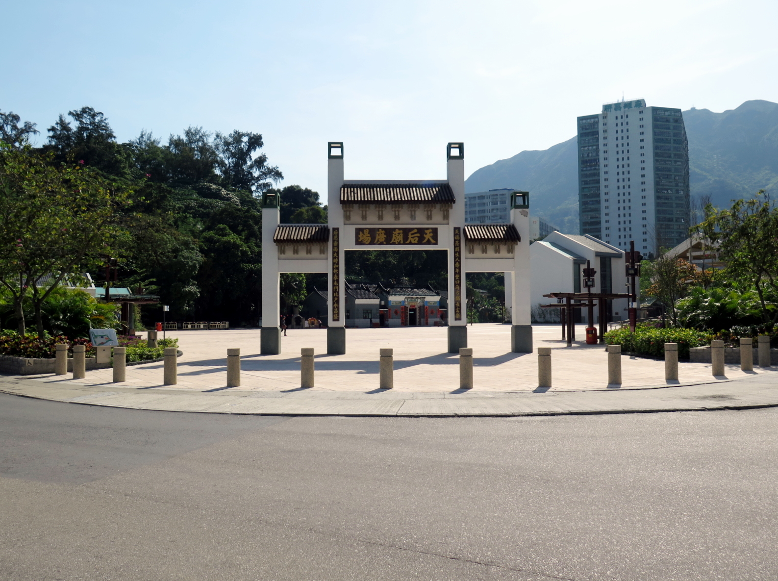 Tuen Mun Tin Hau Temple Square Entrance